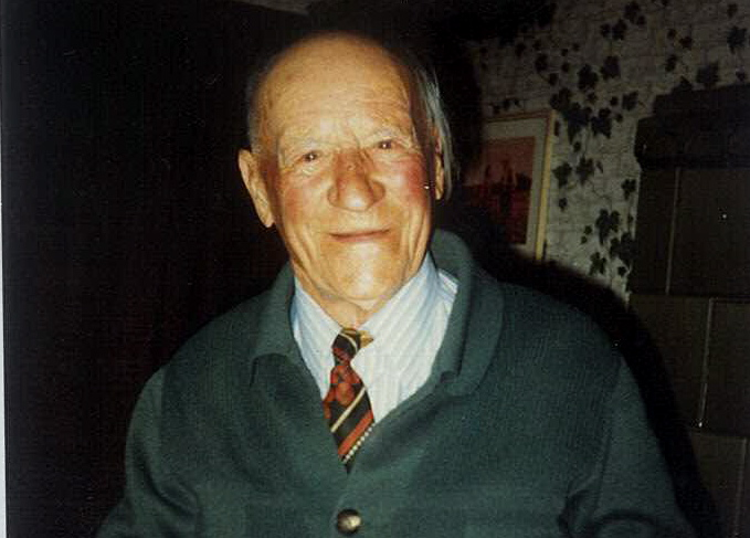 Heinrich Winter war Winzer ("Rebenvater"), erster Nachkriegsbürgermeister, Begründer der Winzerfeste und Erneuerer des Weinbaus in Erzingen (Klettgau) im Landkreis Waldshut in Baden-Württemberg.